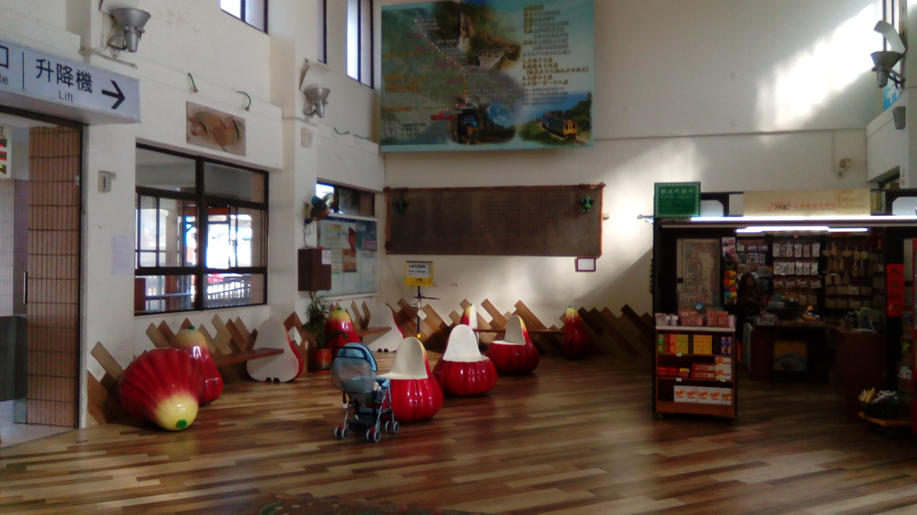 臺灣鐵路管理局枋寮車站大廳蓮霧造型座椅。